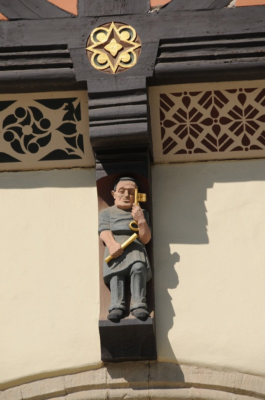 Original image description from the Deutsche Fotothek Beeindruckend ist der figürliche Schmuck des 1498 von Thomas Hilleborch im Bau vollendeten Spielhauses, das 1540 zum Rathaus der Stadt wurde. 33 Figuren sind auf den Knaggen, den Trägern der Balkenköpfe, aufgesetzt. Die Figuren (von 1940) symbolisieren verschiedene Berufsgruppen. Aufgenommen im Mai 2008. Foto Uwe Gerig